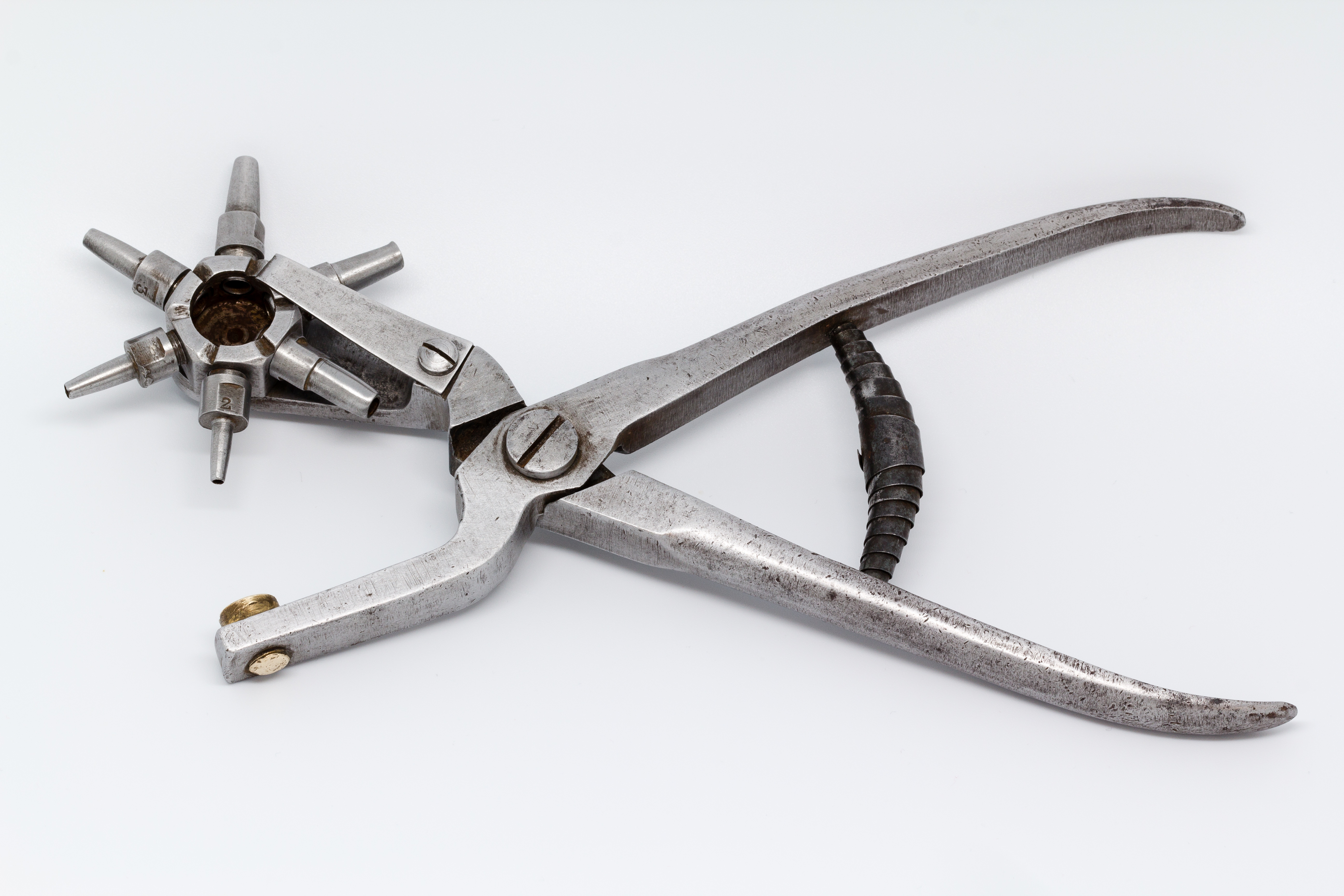 Pince emporte-pièce revolver 6 trous pour le travail du cuir. Embouts échangeables.